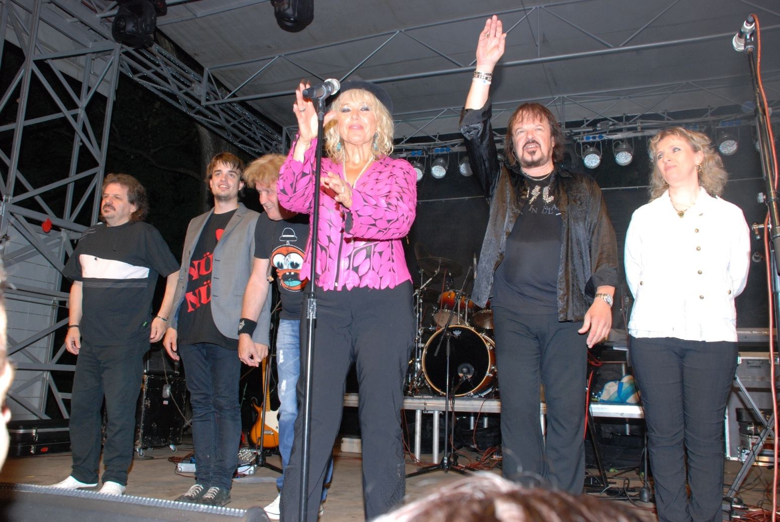 A Neoton együttes a tiszalöki koncert végén:Lukács LászlóHeatlie DávidBaracs JánosCsepregi ÉvaVégvári ÁdámLukács AndreaHelyszín: Tiszalök.